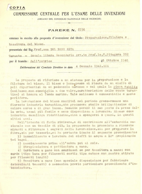 Documento della Commissione centrale per l'esame delle invenzioni del Consiglio nazionale delle ricerche in cui viene espresso parere favorevole sulla proposta presentata dalla professoressa Rita Del Bene circa un innovativo sistema di preparazione e filatura del bisso marino, ritenuto degno di considerazione per i concetti autarchici cui s'ispira, Taranto 4 gennaio 1941 (AS Taranto, Confederazione fascista dei professionisti ed artisti di Taranto, fasc. Inventori)